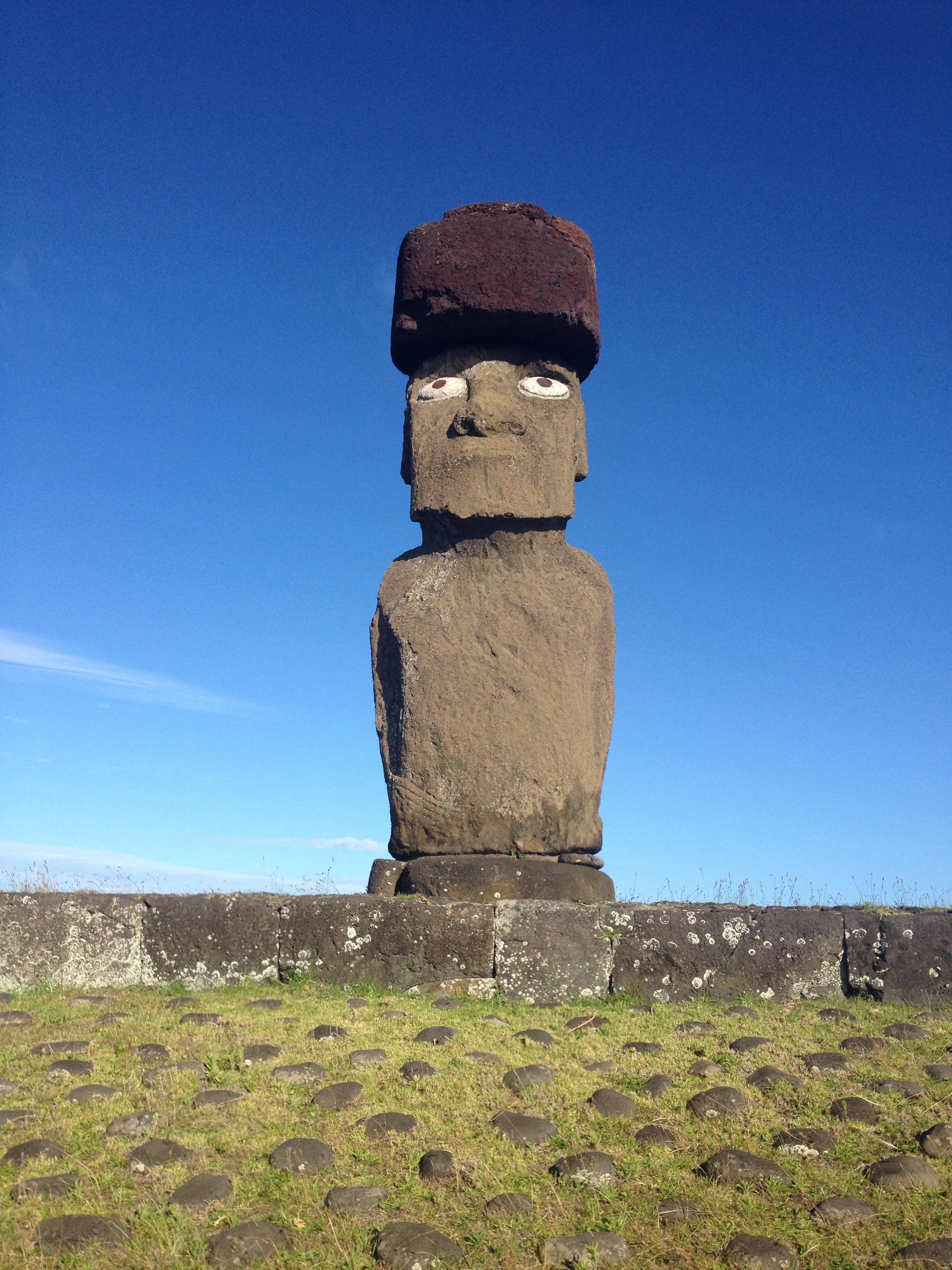 עיניים מאלמוג לבן